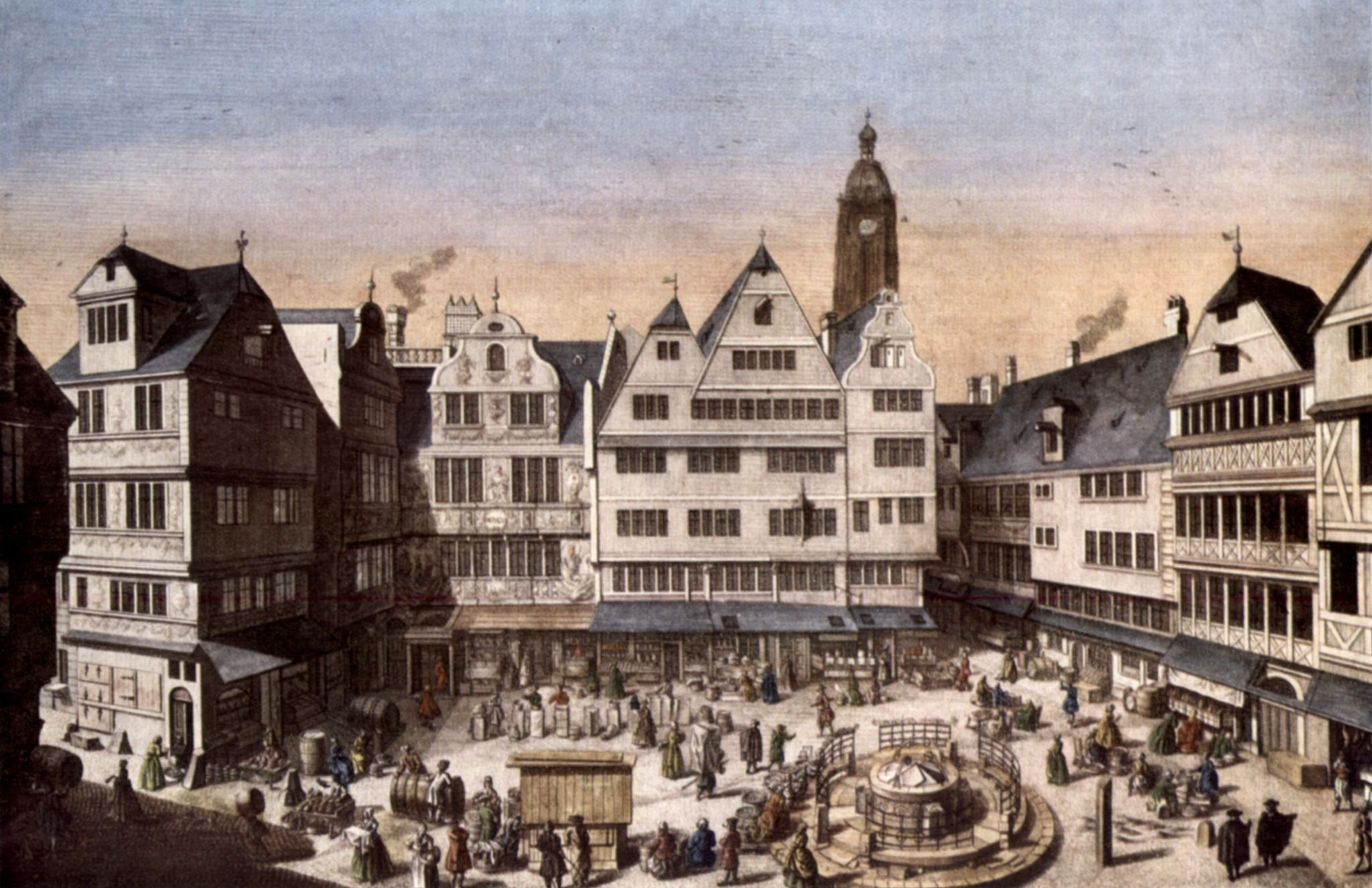 kolorierter Kupferstich 21 x 32 cm; Ansicht des Hühnermarktes von Westen 1738